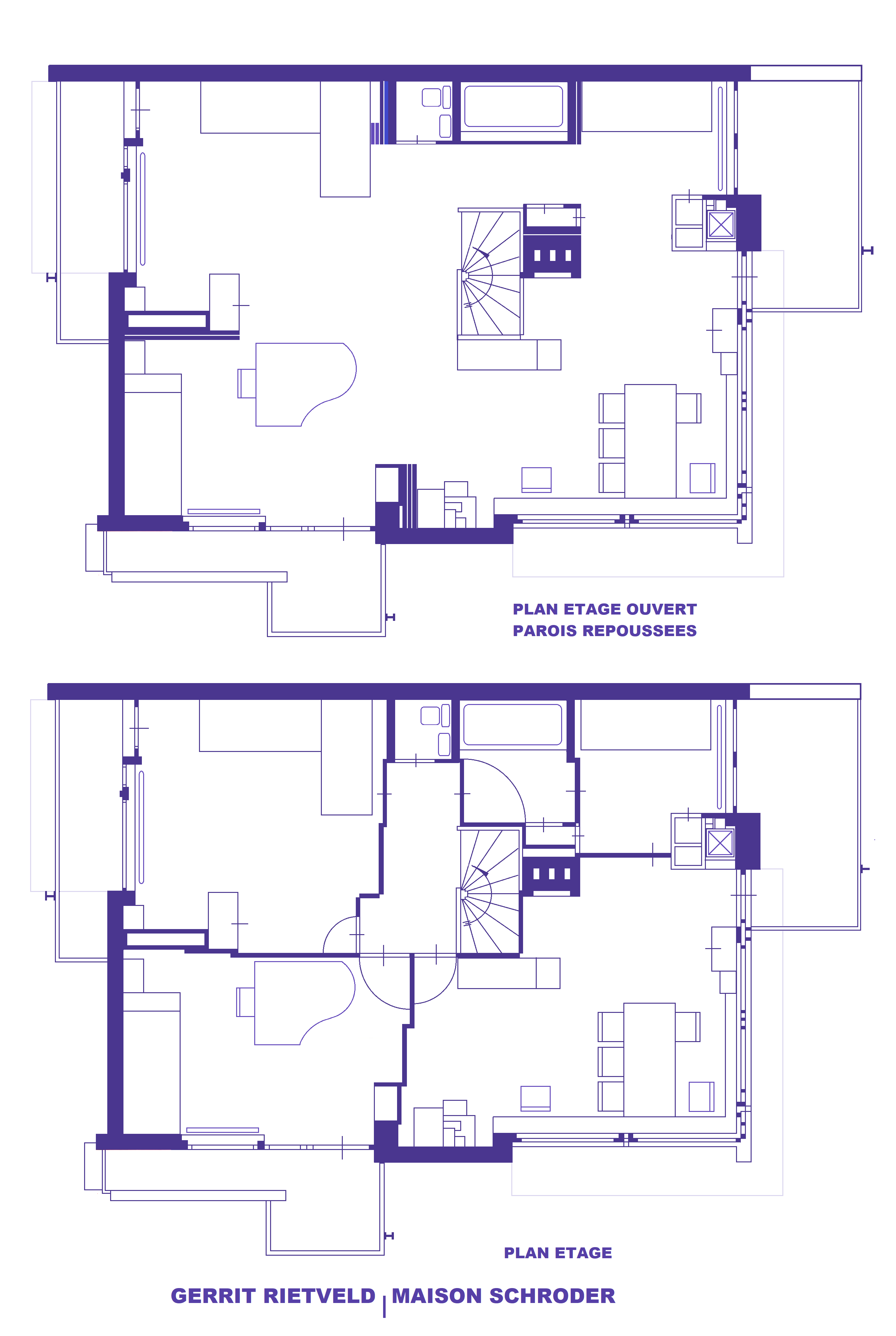 Gerrit Rietveld, Maison Schröder, plan étage avec variante parois repoussées